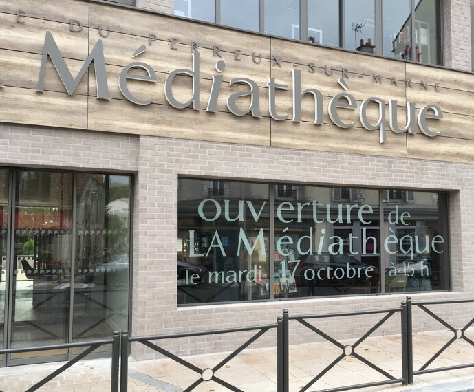 Façade de la Médiathèque du Perreux-sur-Marne en novembre 2017